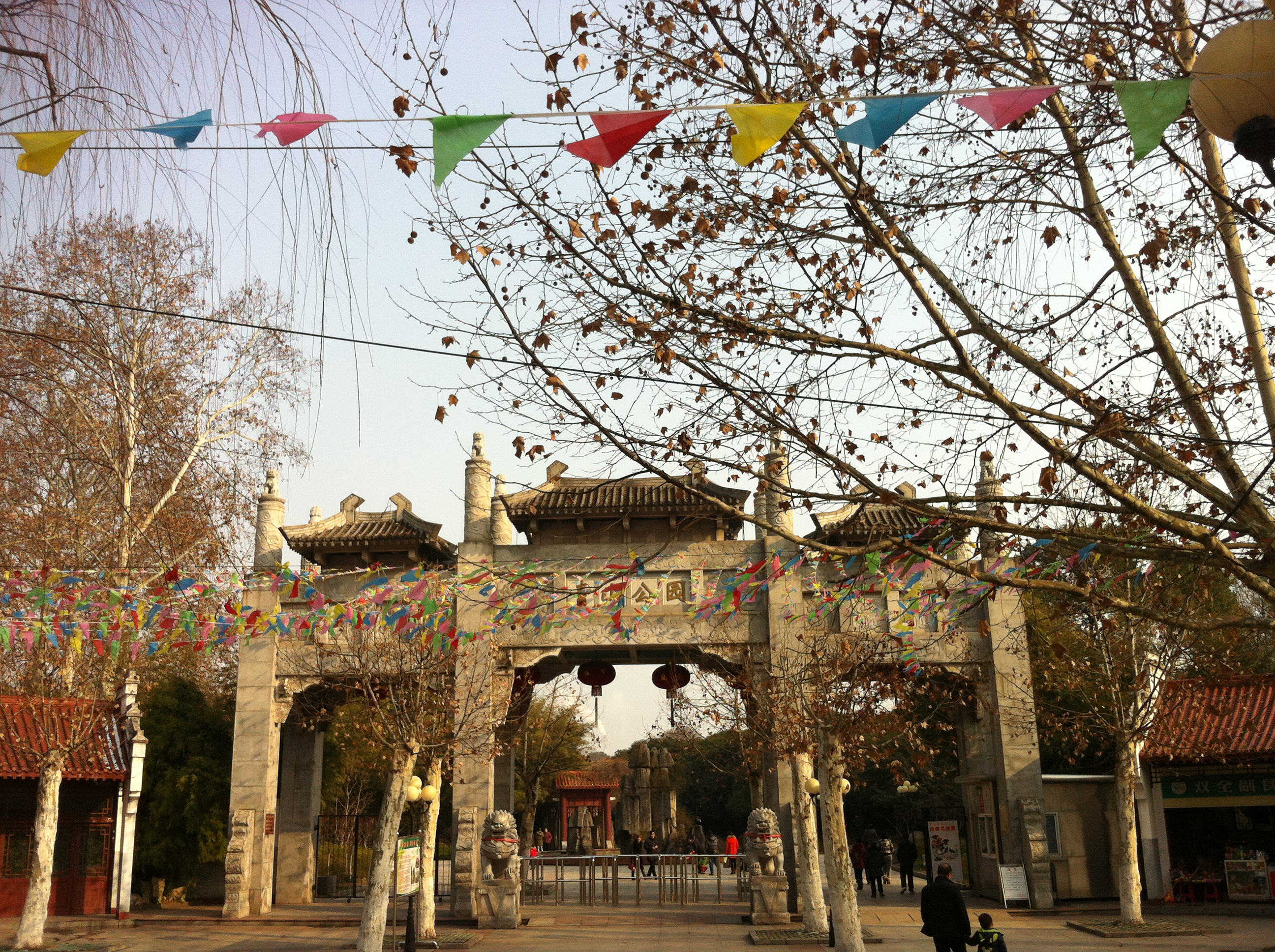 武汉青山公园